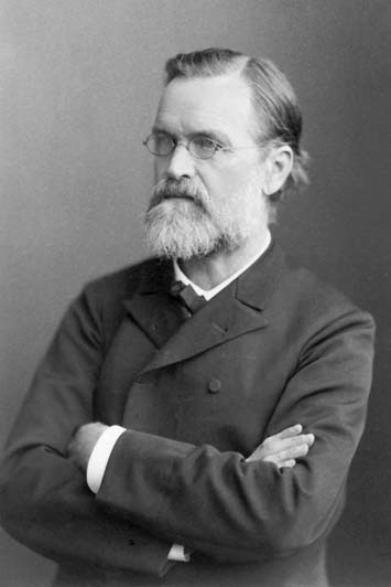 Карл Антонович Кламрот (нем. Karl Klamroth; 1828—1912) — российский скрипач немецкого происхождения, концертмейстер оркестра Большого театра.